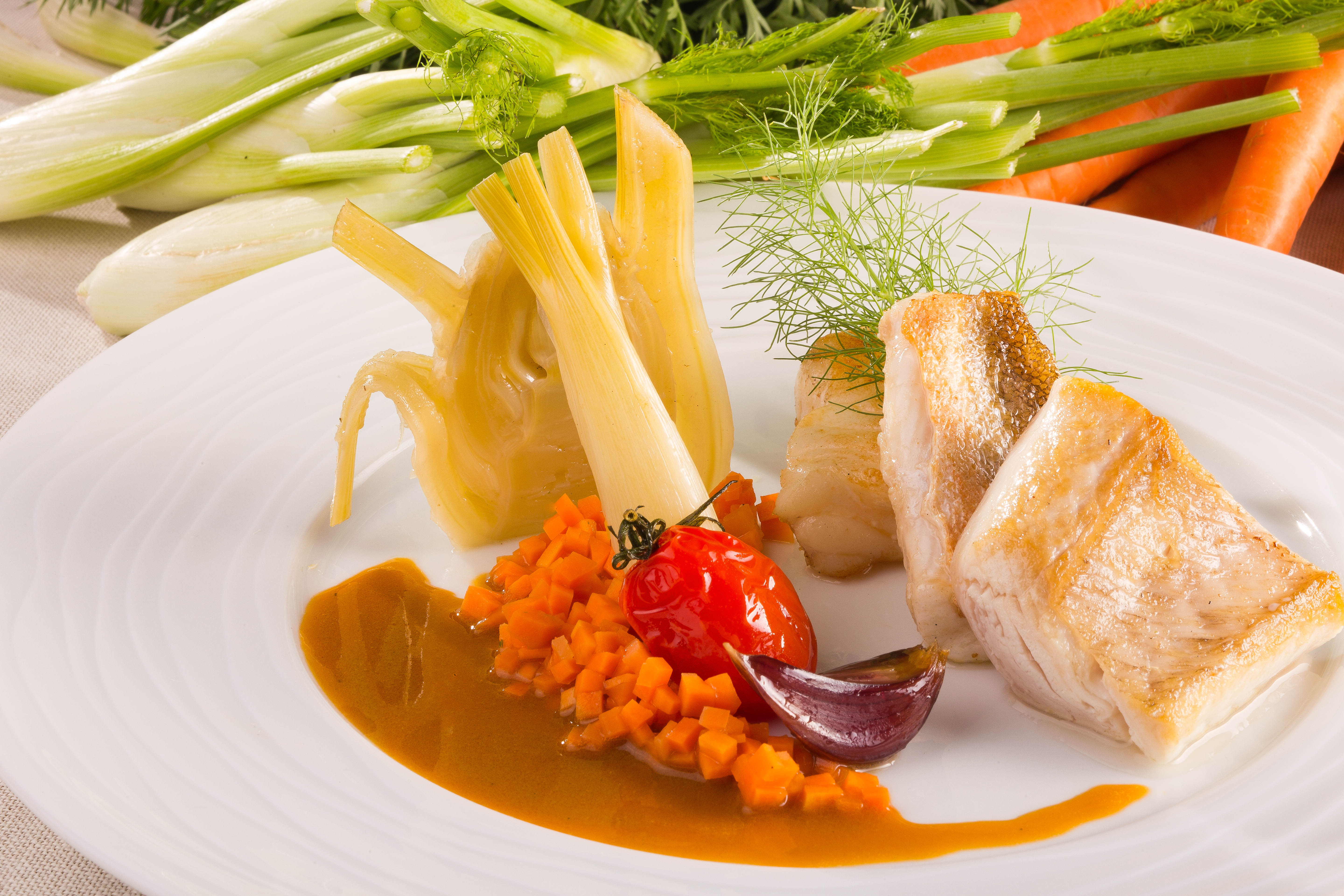 Baudroie en nage de légumes